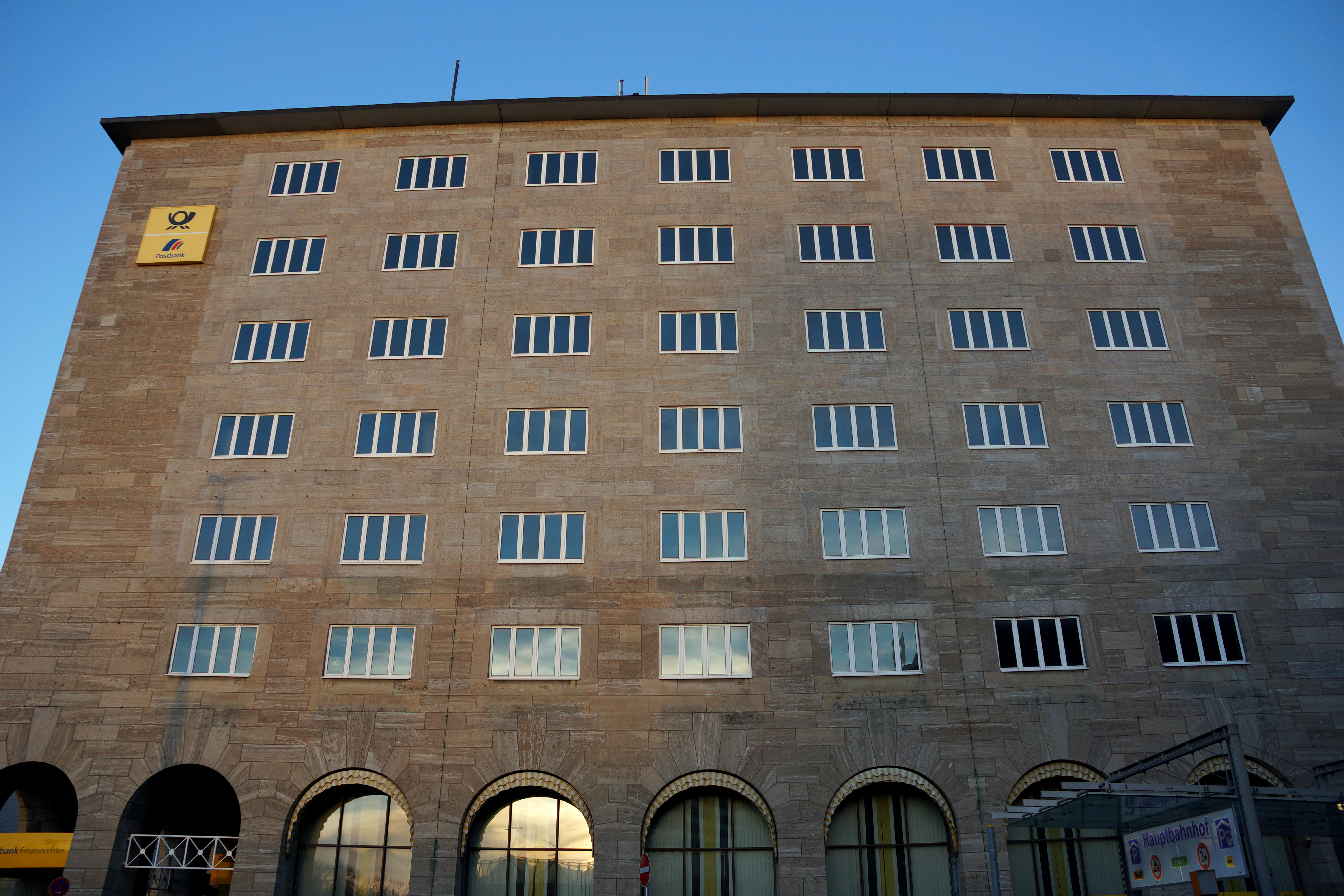 Die ehemalige Hauptpost am Hauptbahnhof in Nürnberg